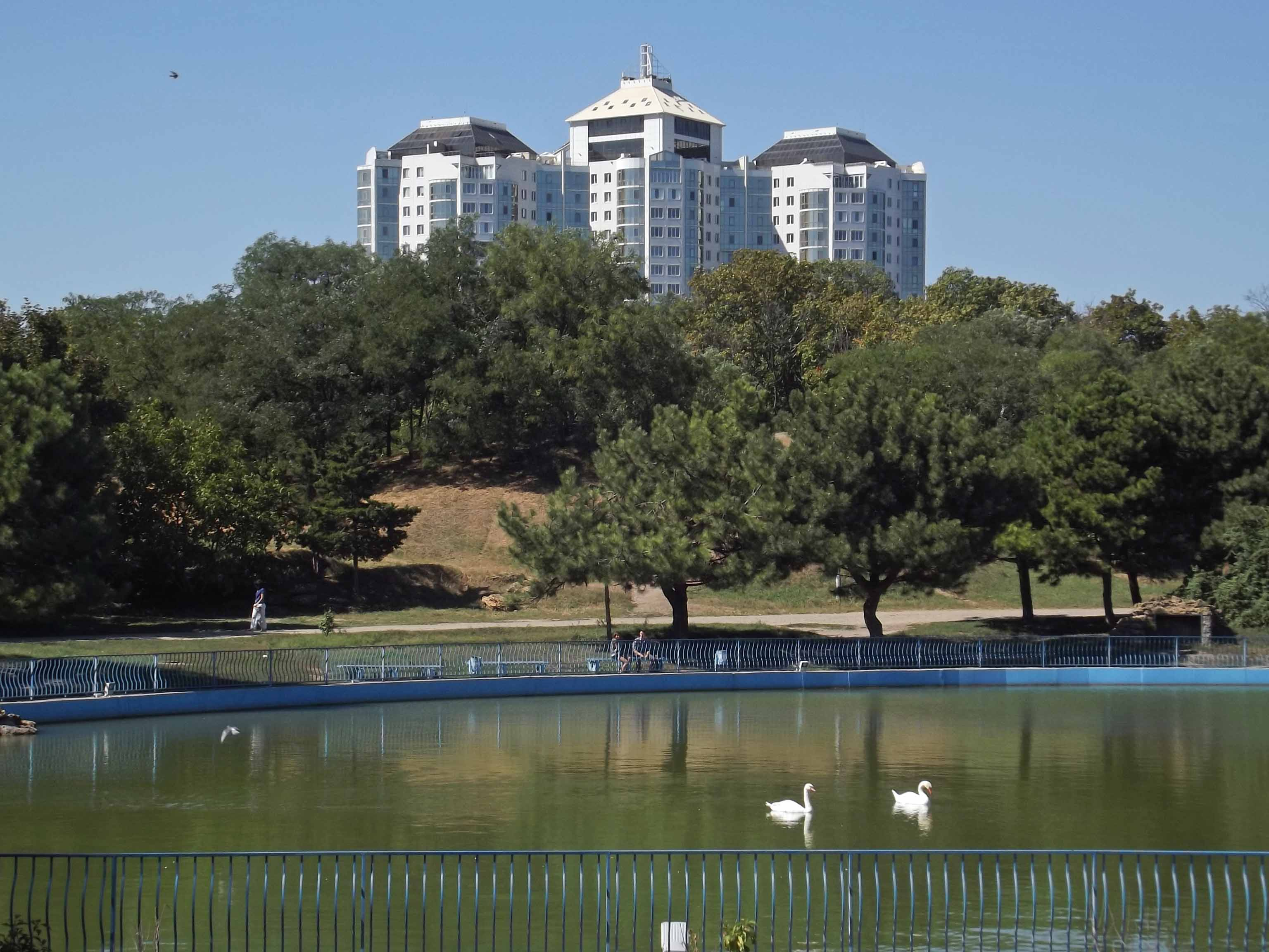 Парк Победы